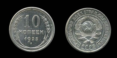 10 копеек 1925, серебро 500-й пробы.